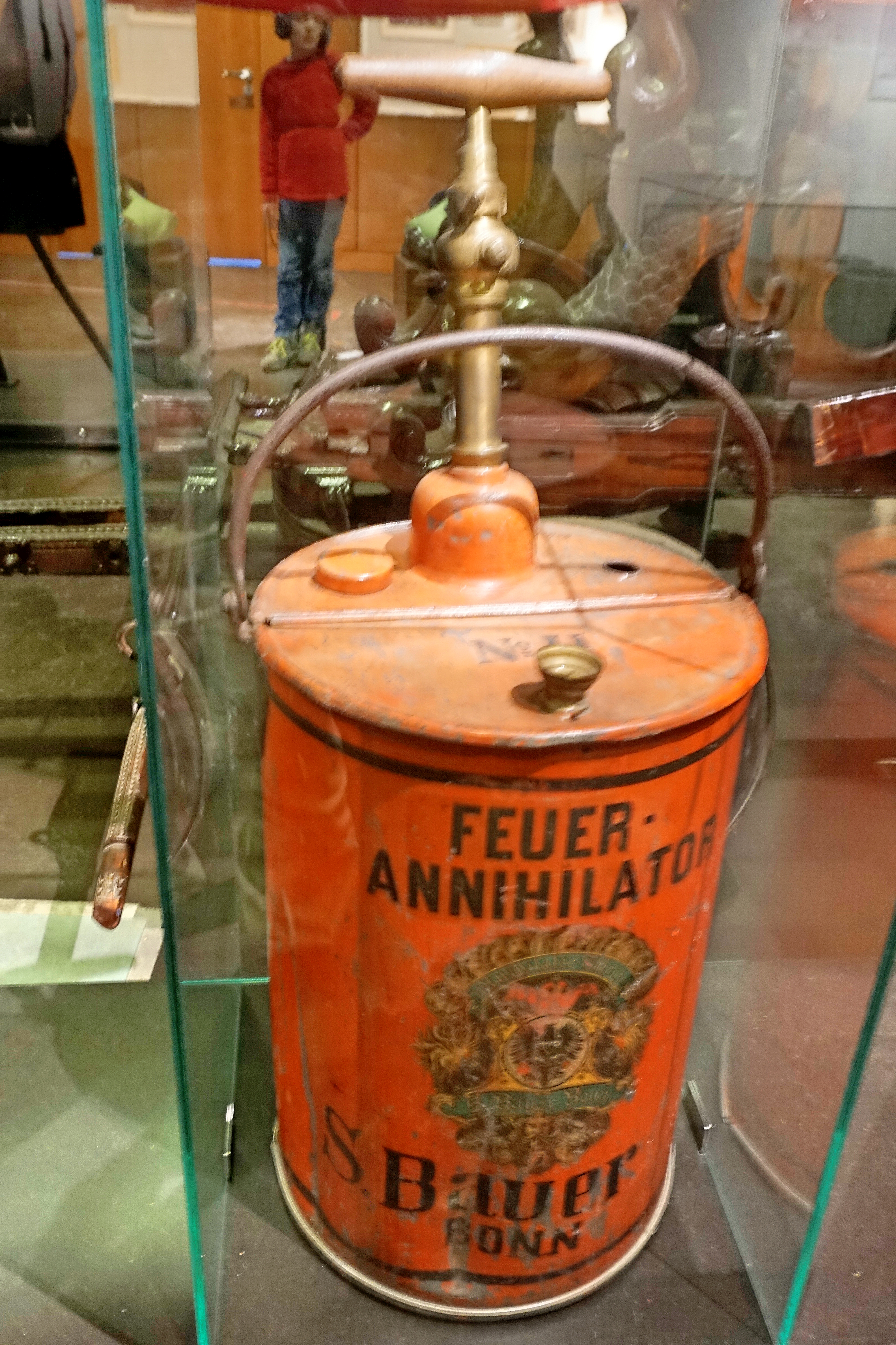 Feuer Annihilator Siegfried Bauer, Bonn, um 1885